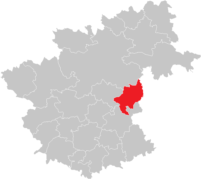 Bezirk Zwettl